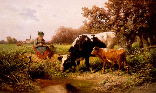 La mare a souvent d'abord servi au bétail (Peinture d'Adolf Chelius ; 1856-1923).